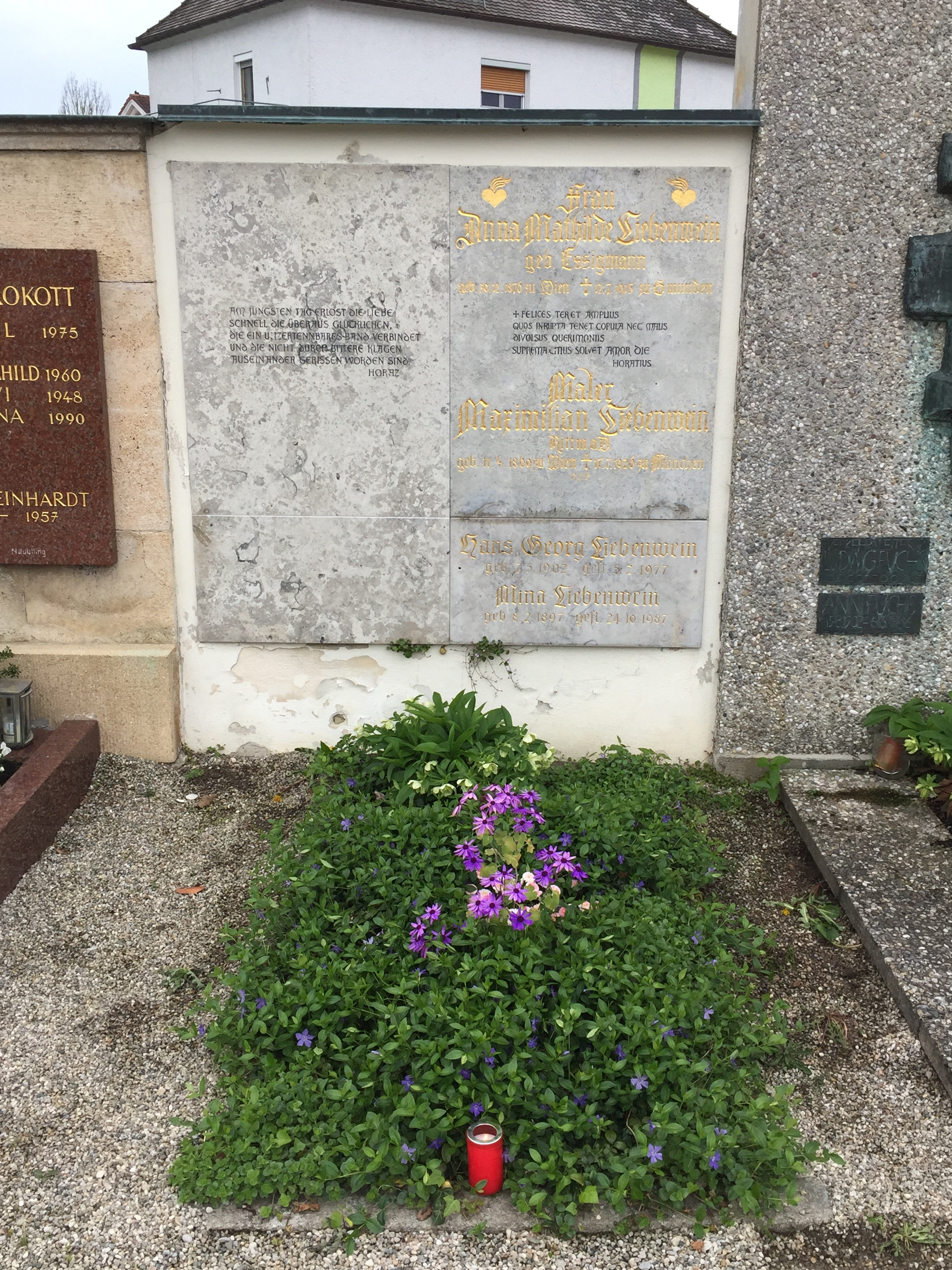 Grab der Familie Liebenwein auf dem Burghauser Friedhof.